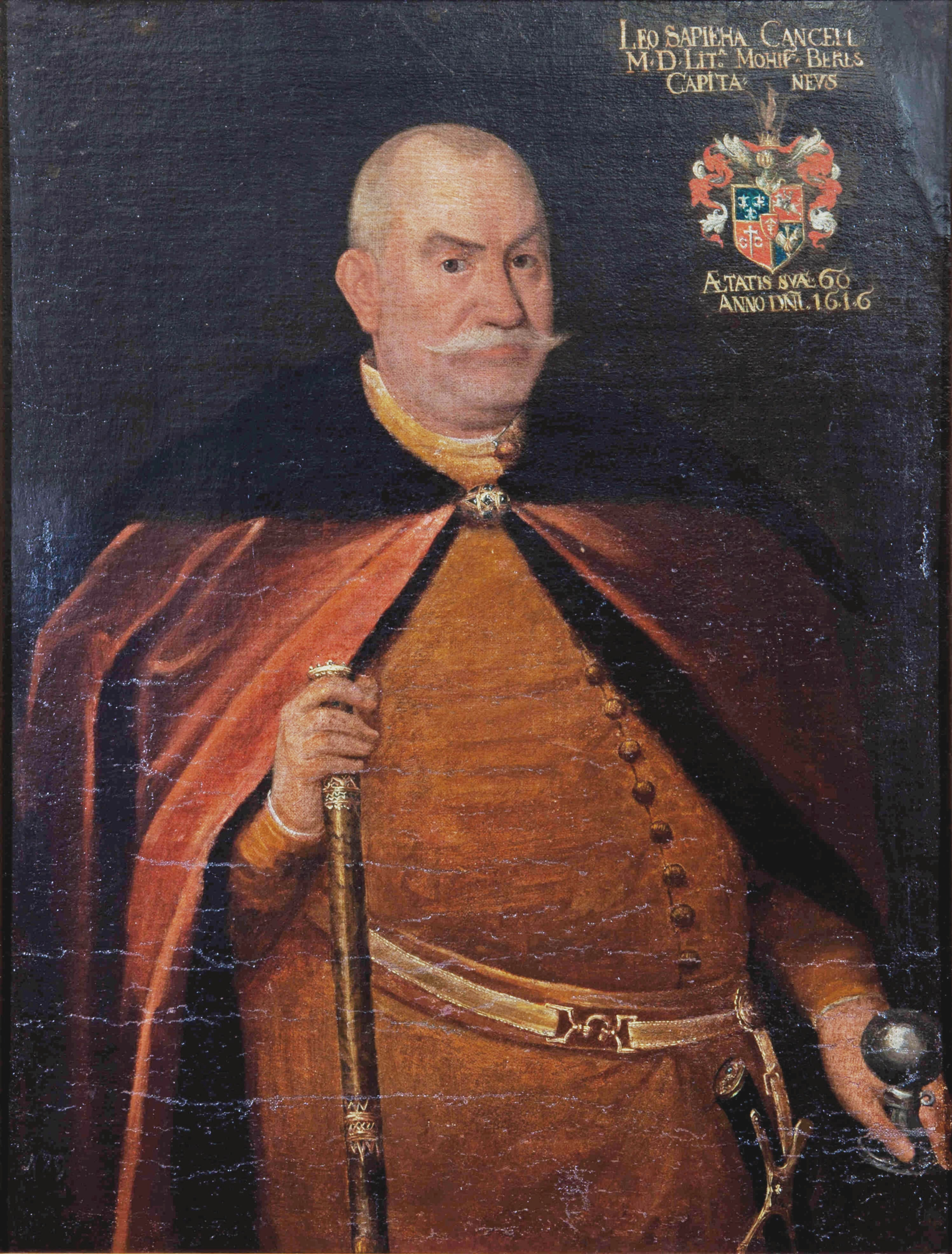 Беларуская (тарашкевіца): Партрэт Льва Сапегі (Leŭ Sapieha).